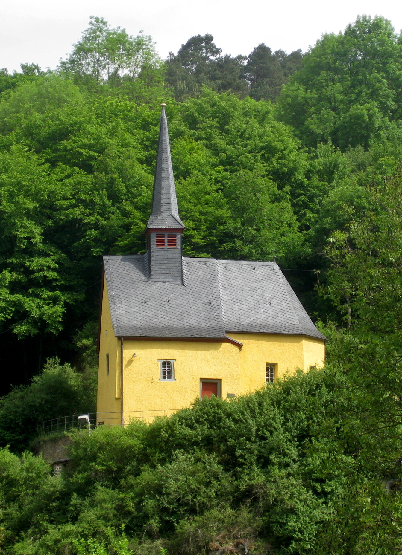 Katharinenkapelle, Ahrbrück This is a retouched picture, which means that it has been digitally altered from its original version. Modifications: rotated, cropped, colour-corrected, sharpened. Modifications made by Máel Milscothach.